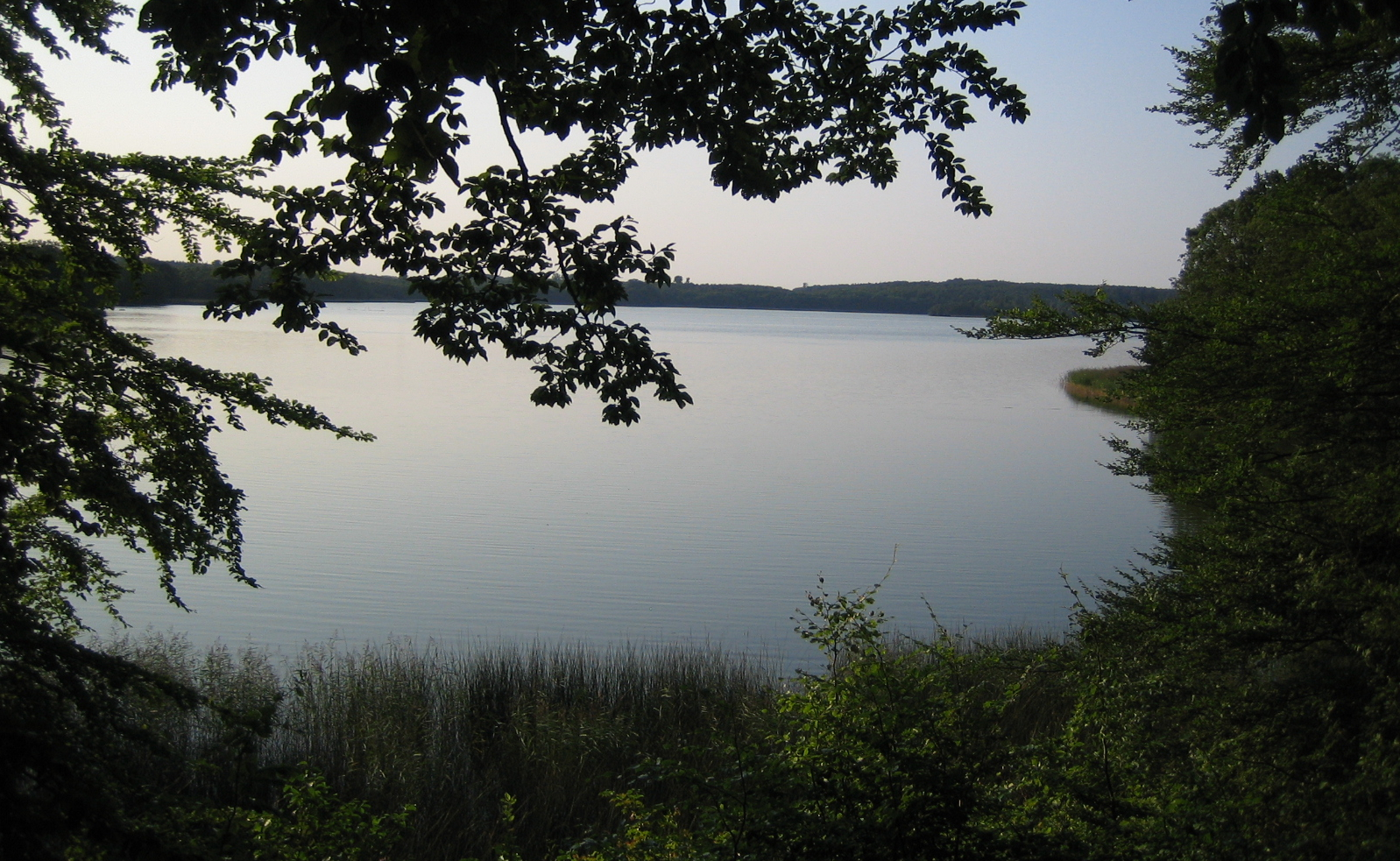 Krageholmssjön in Skåne, Sweden